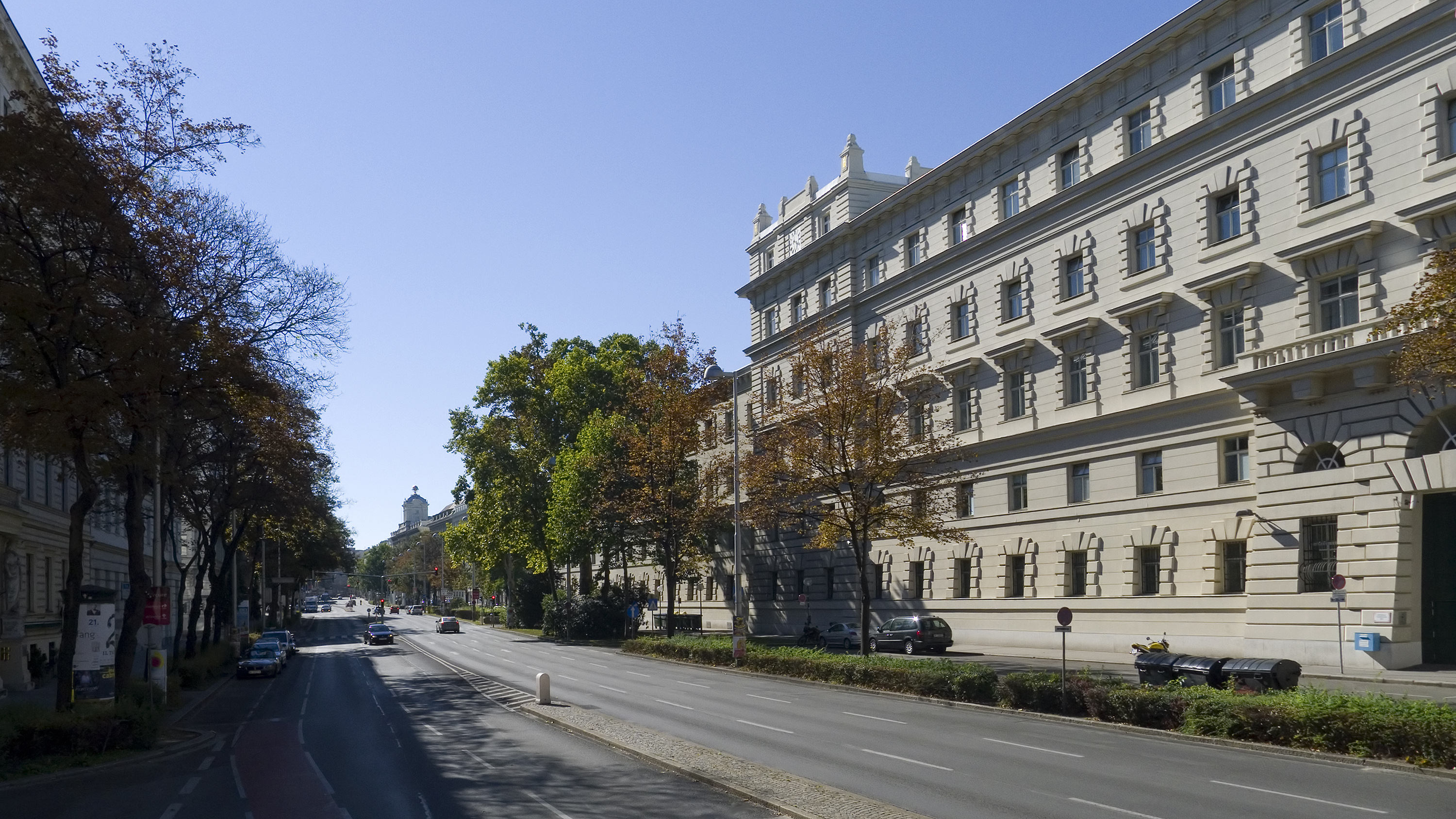 Landesgerichtsstraße in Wien 1 bei Nr. 20 Richtung Süden